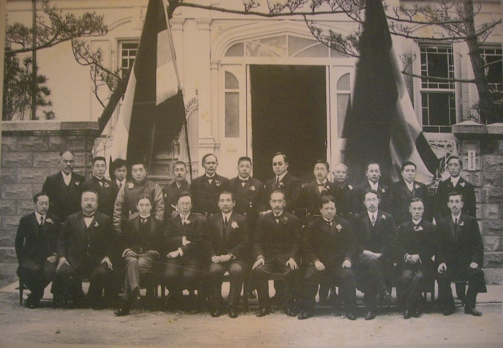 神戶華僑接待孫中山一行的午餐會留影。攝於1913年3月14日，地點為今神戶市舞子的孫文紀念館前。